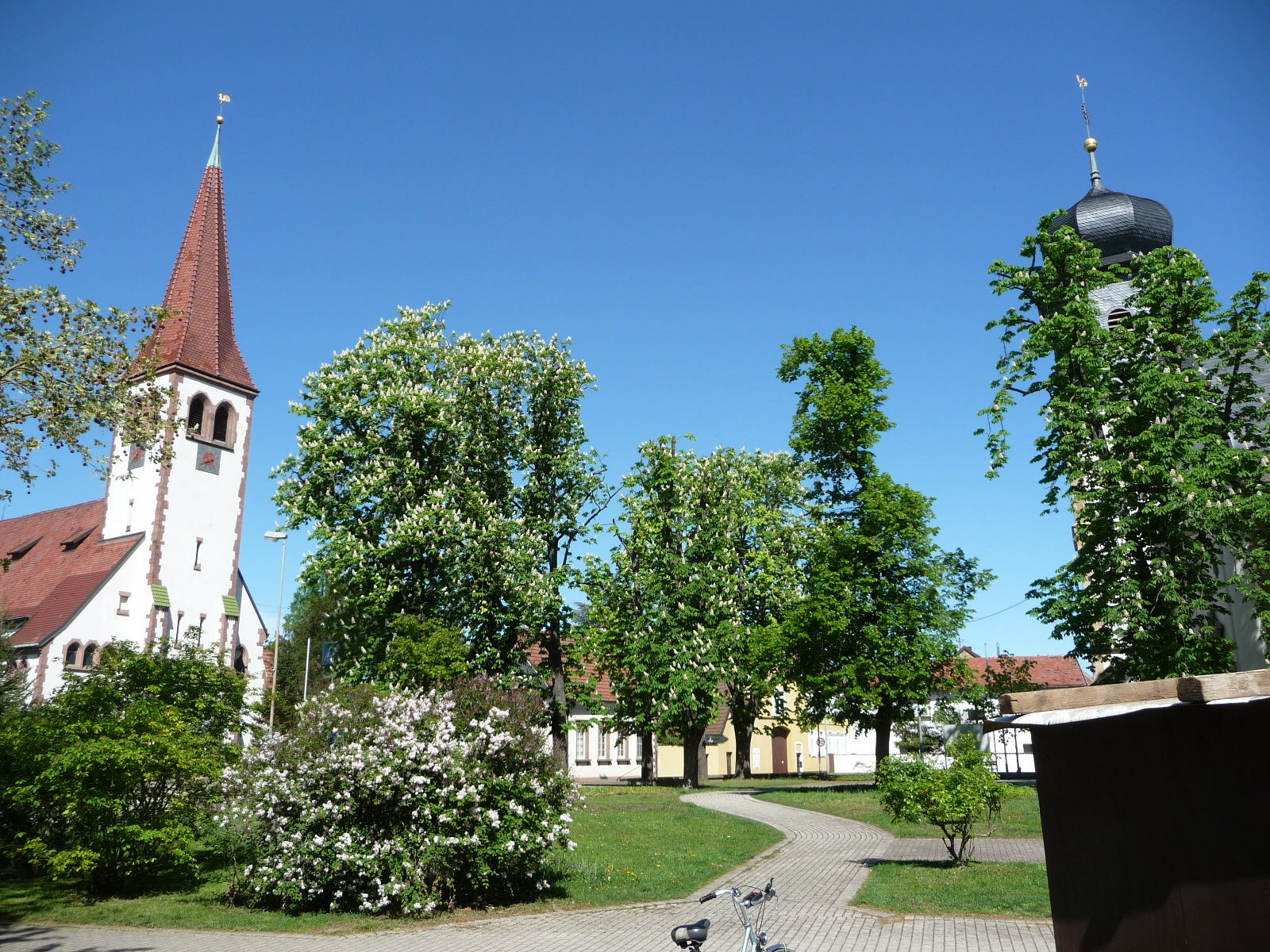 Churches in Eppstein (Frankenthal)